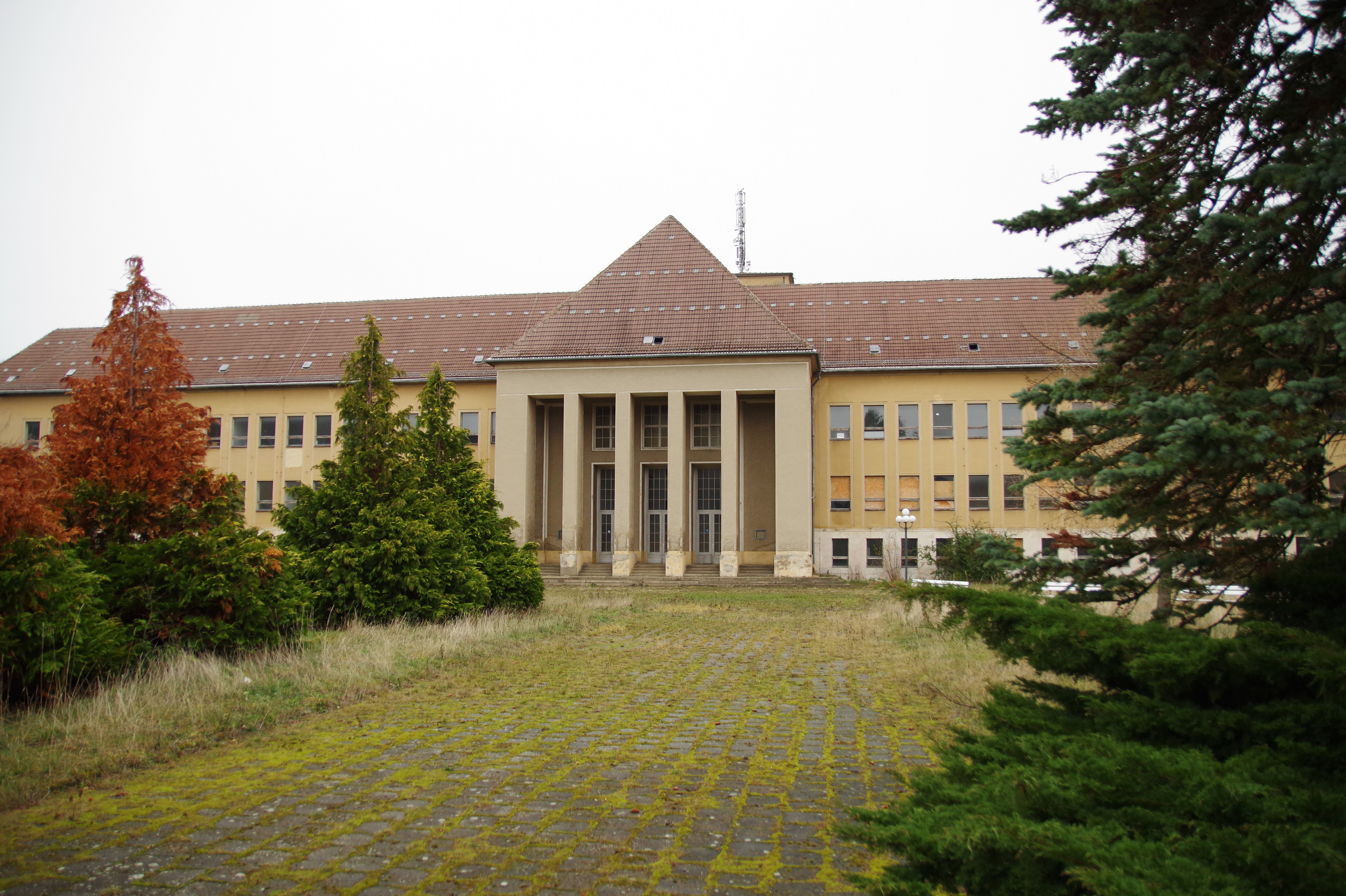 ehemalige Napola und spätere Bezirksparteischule auf dem Großen Ziegenberg in Ballenstedt